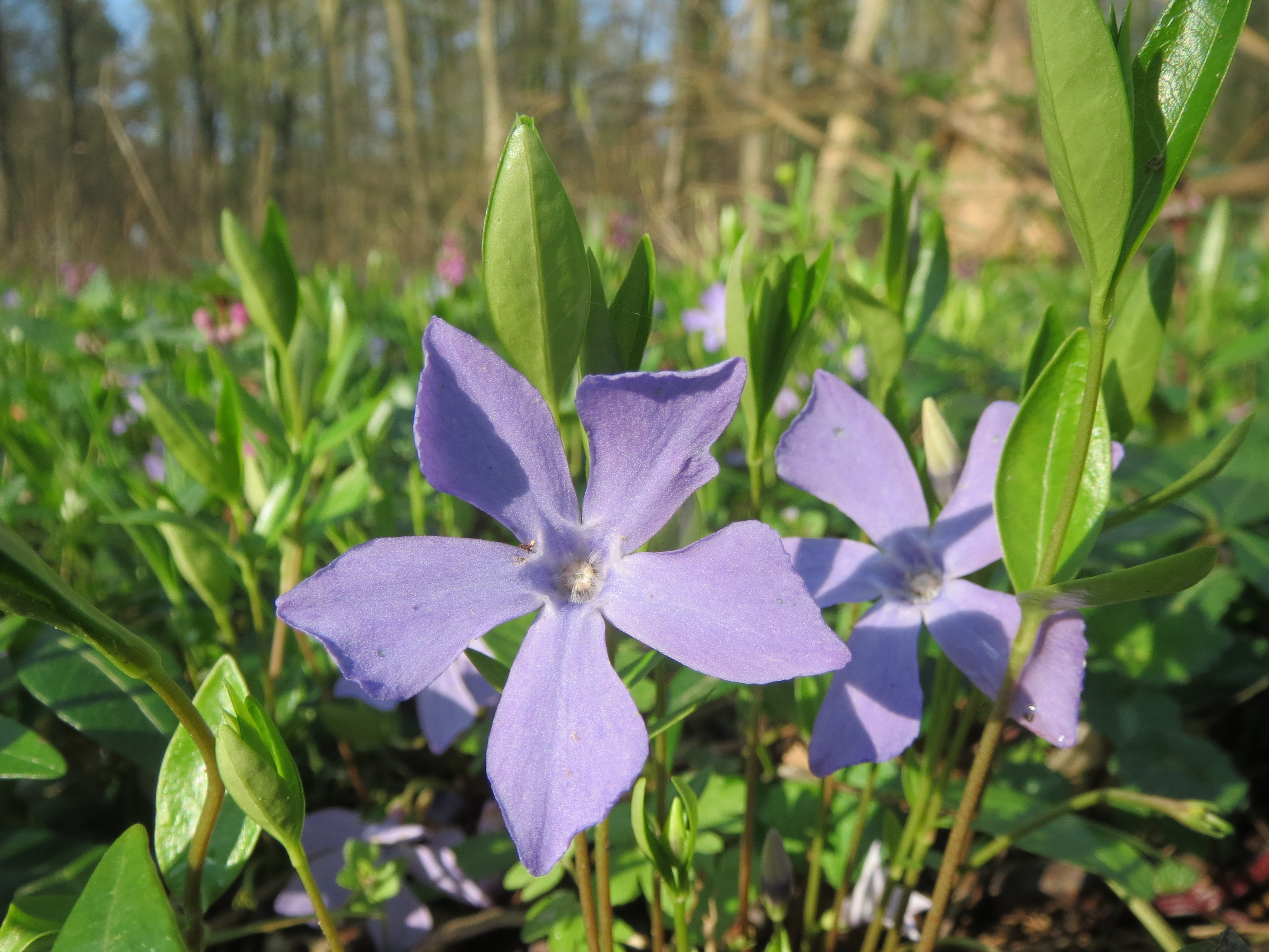 Kleines Immergrün (Vinca minor) im Schwetzinger Hardt